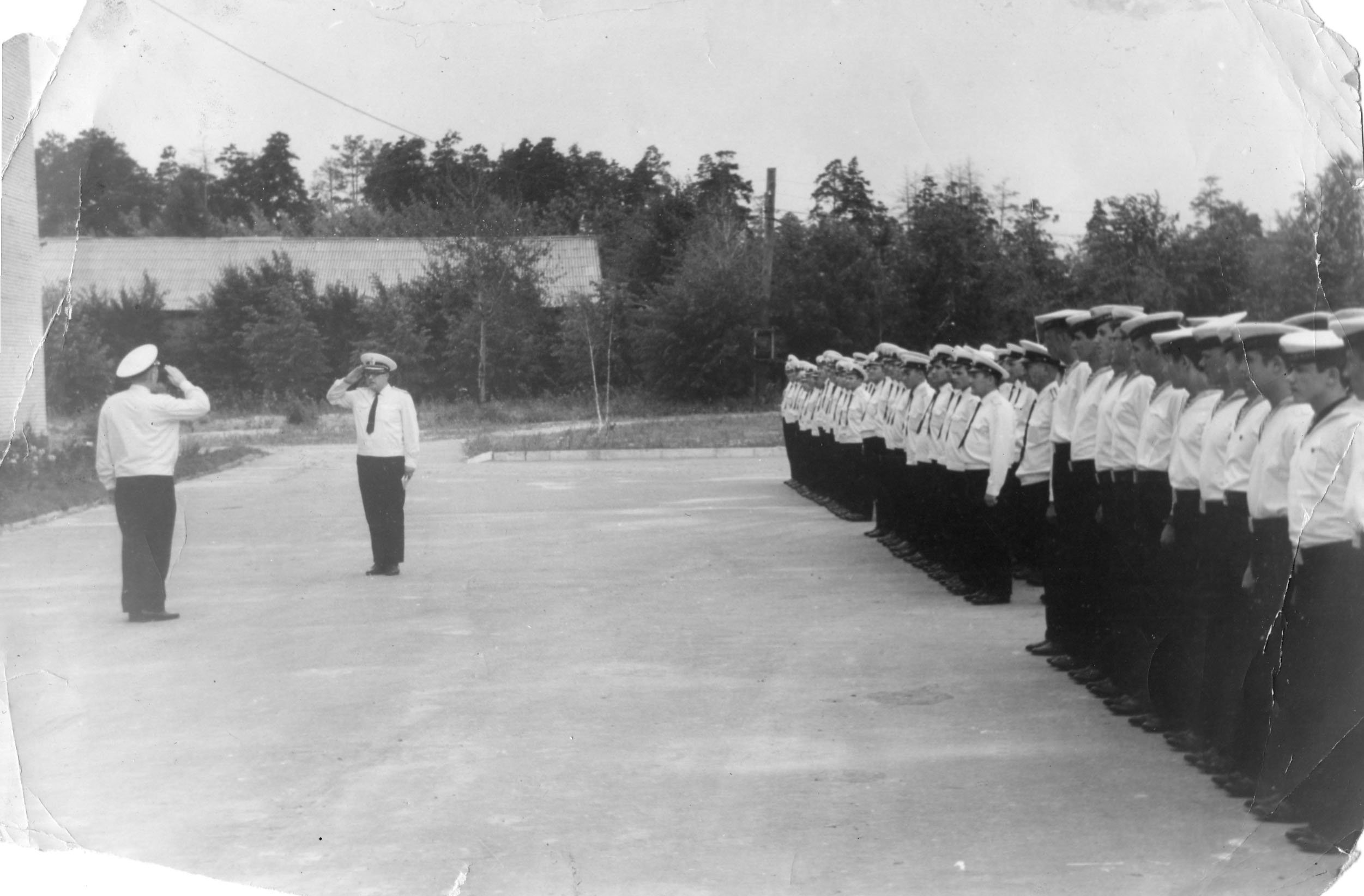 Kupavna NAVY Day Celebration 1970